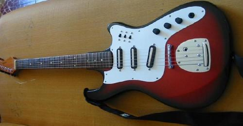 A Tonante guitar.